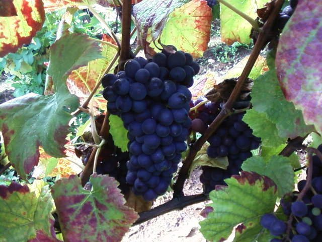 Grappes de raisins (Pinot Noir) à Givry (71)